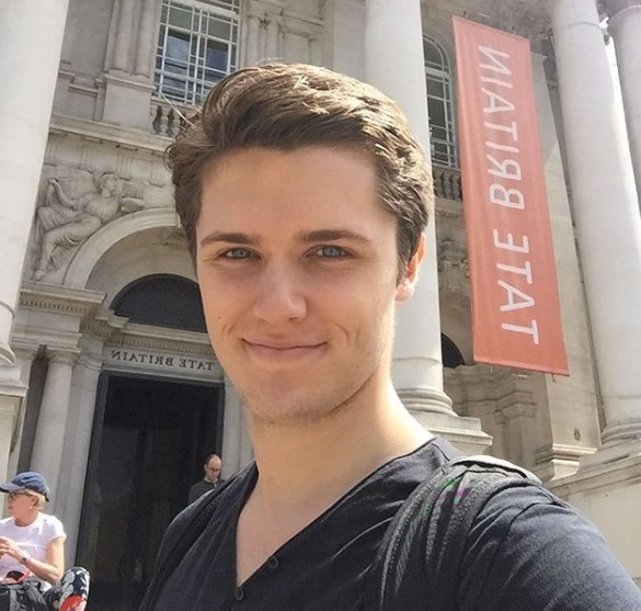 Eugene Michael Simon in 2018